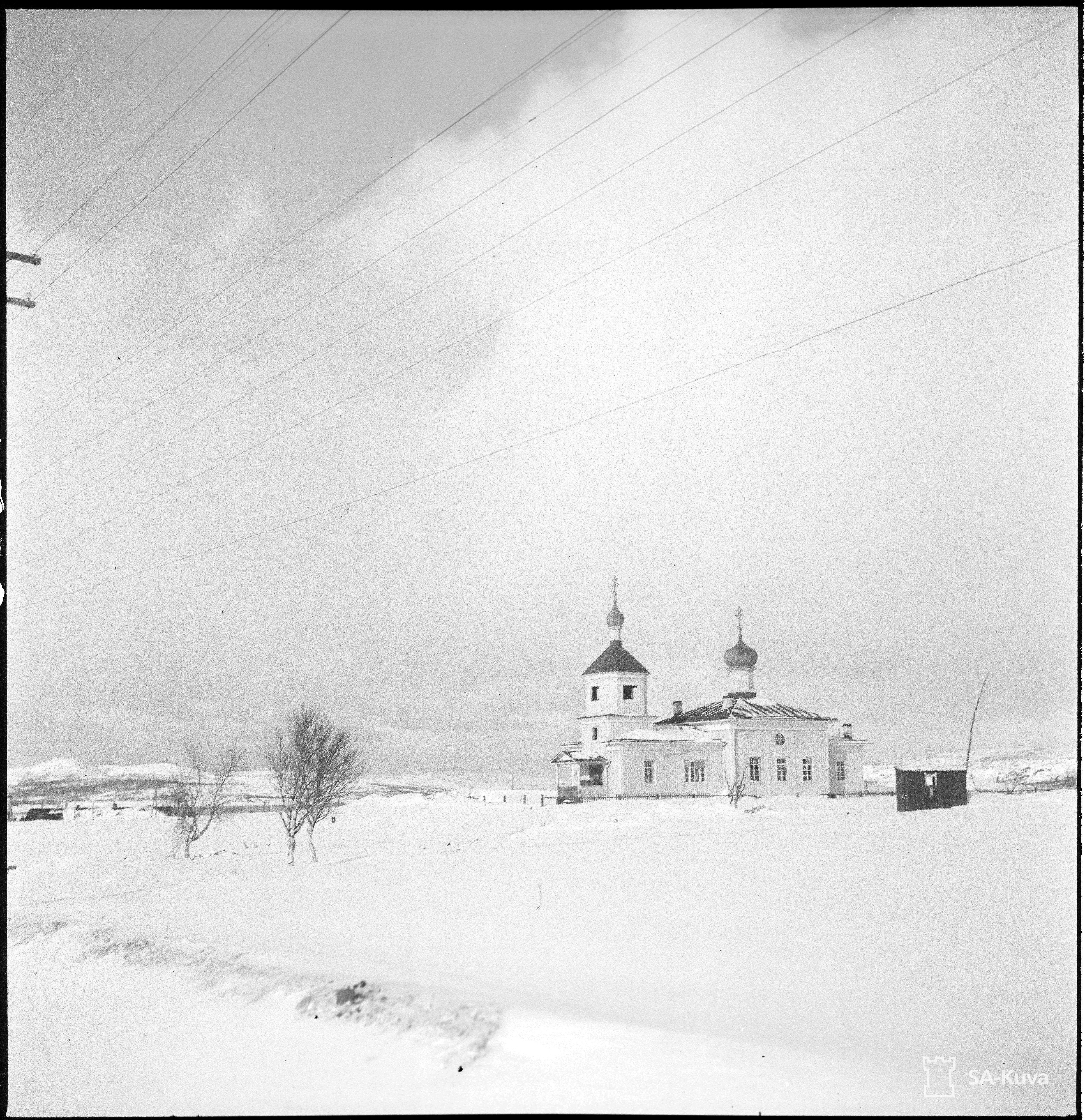 Parkkinan kirkko Petsamossa.